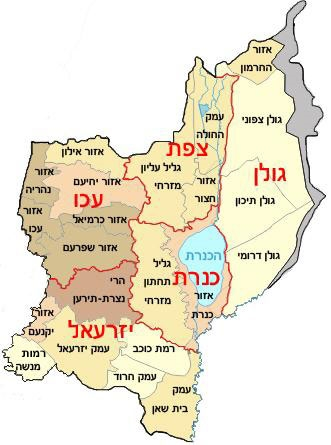 מחוז הצפון, מחולק לנפות